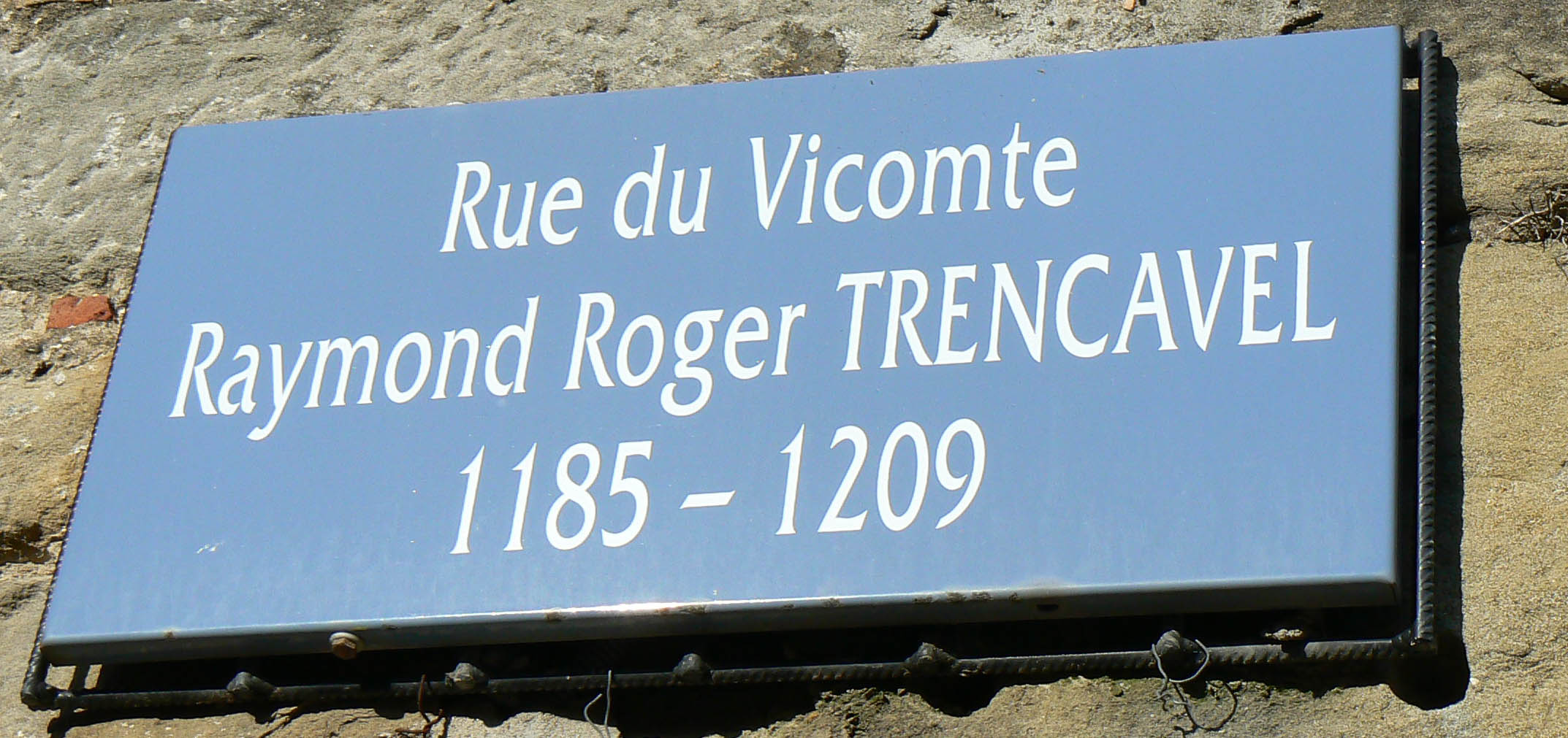 Cedule